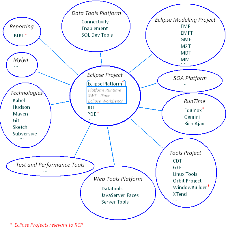 Schéma de la 'nébuleuse' des projets Eclipse organisés par famille, sur la base de